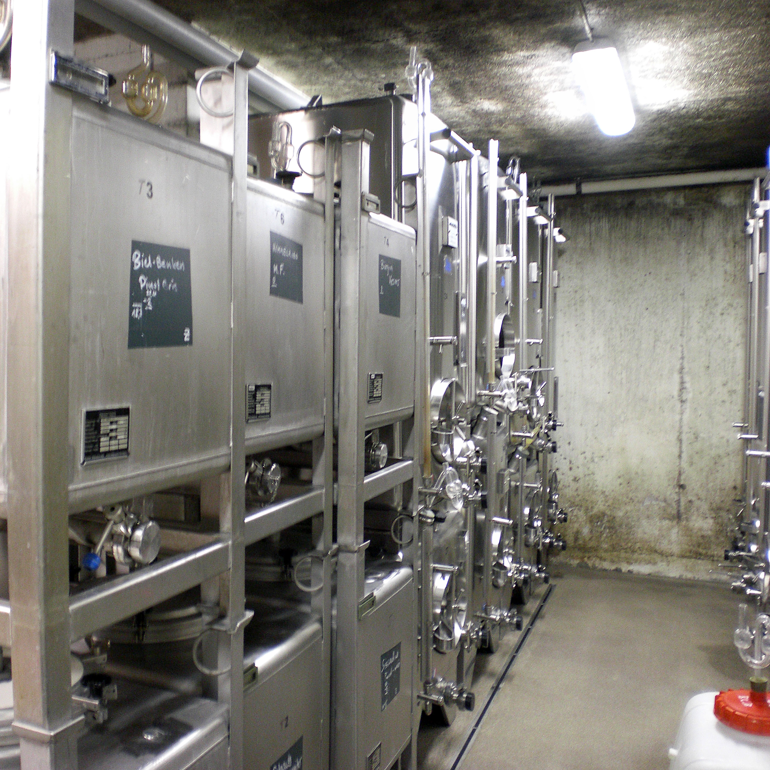 Weingut Tschäpperli in Aesch (Basel Land, Schweiz), Gärkeller